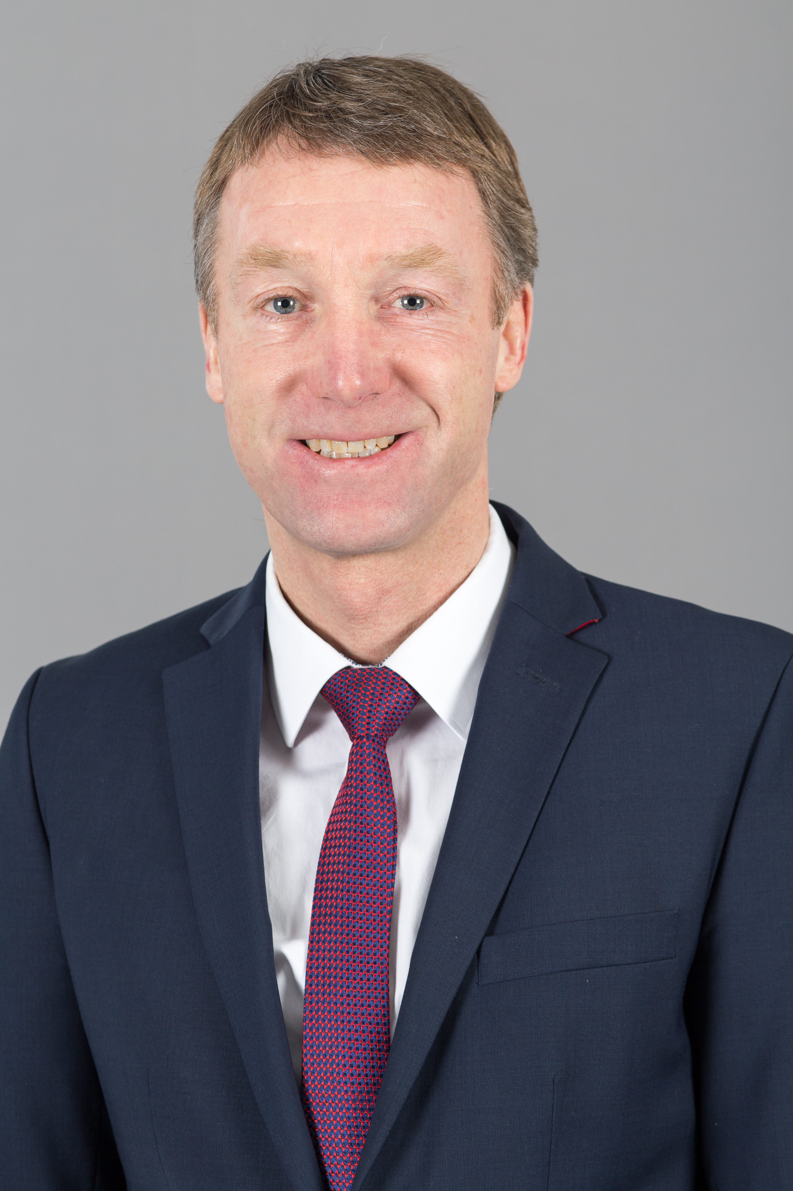 Raymond Walk